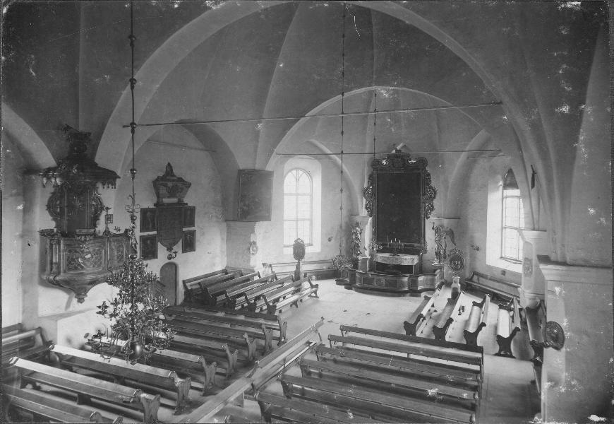 Interiör mot koret, före 1905-06 års restaurering. Kategori: (02) Interiörer Interiör mot koret, före 1905-06 års restaurering.